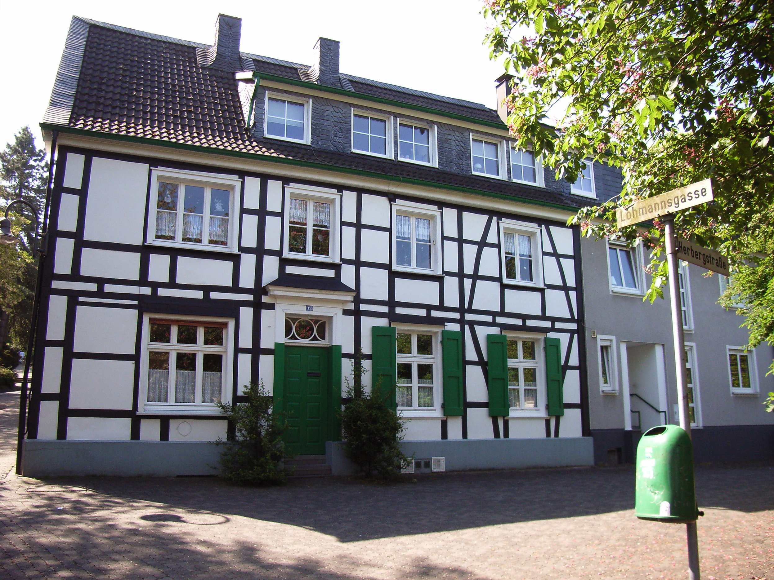 denkmalgeschütztes Haus Nr. 12 an der Herbergstraße in Schwelm (NRW, Deutschalnd)